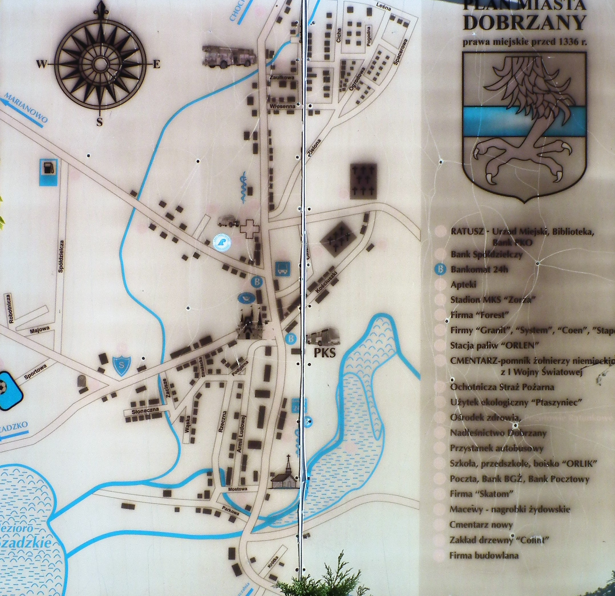 Plan miejski z Dobrzan - tablica w centrum miasta.